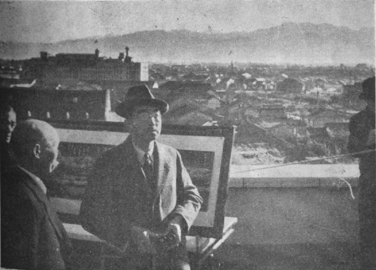 県庁上にて富山市を天覧する昭和天皇